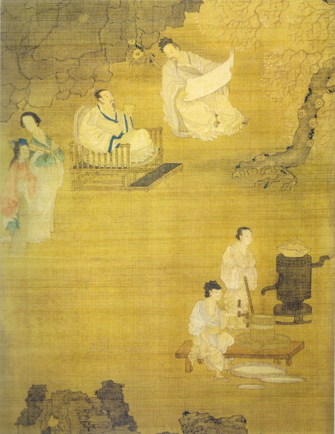 Réception d'un hôte dans le jardin des abricotiers, rouleau mural, encre et couleur sur soie, 1638, par le peintre chinois Cui Zizhong, actif début XVIIe siècle, mort en 1644. Collection Nicolas Cahill, prêt à long terme à l'université de Californie, Berkeley, Art Museum.